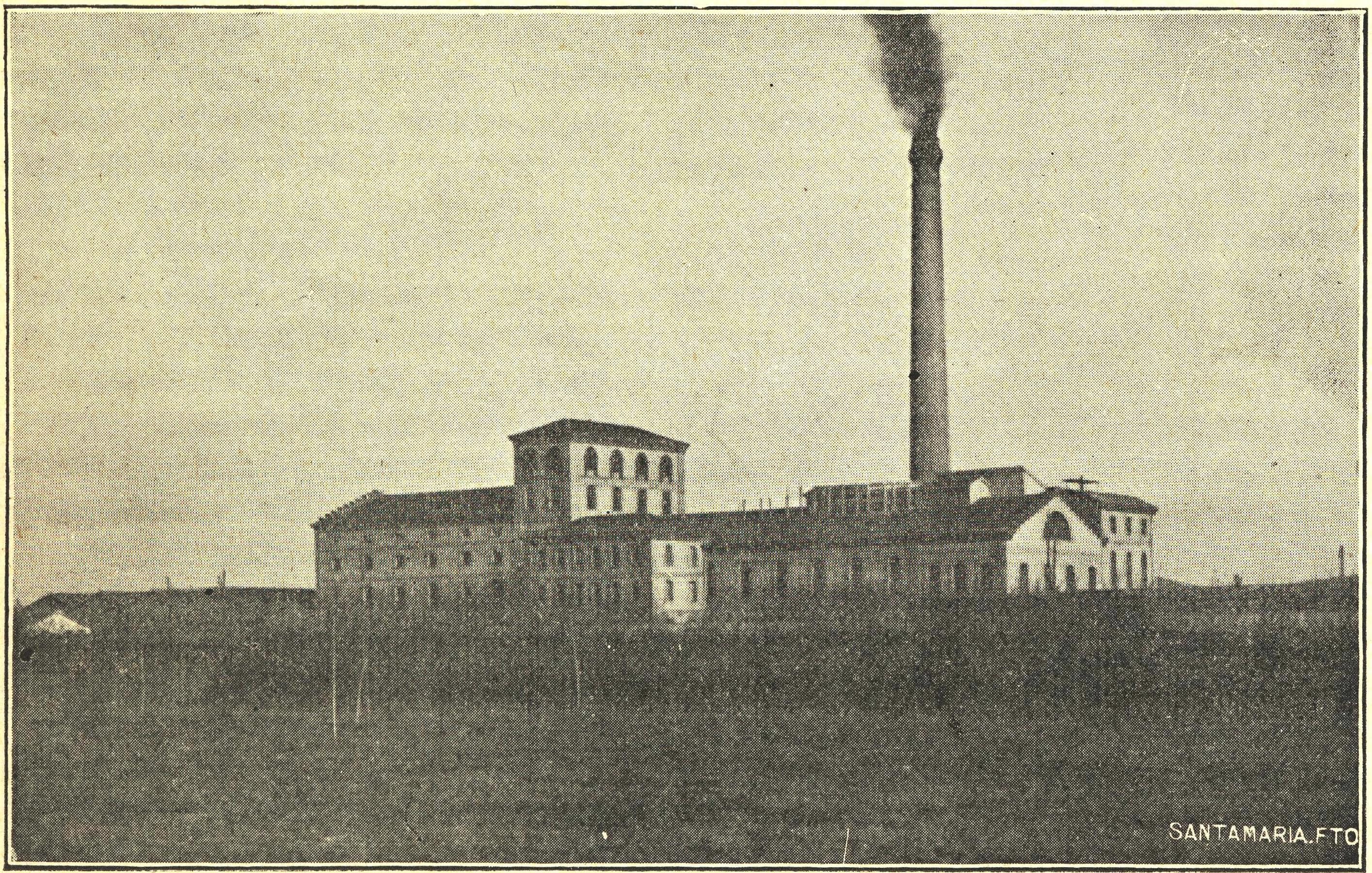 Martzillako azukre fabrika